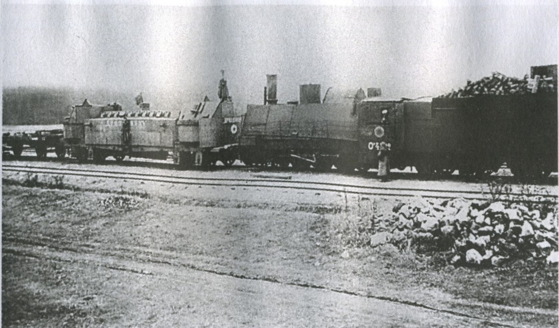 Бронепоезд «Дроздовец» в боях под Курском